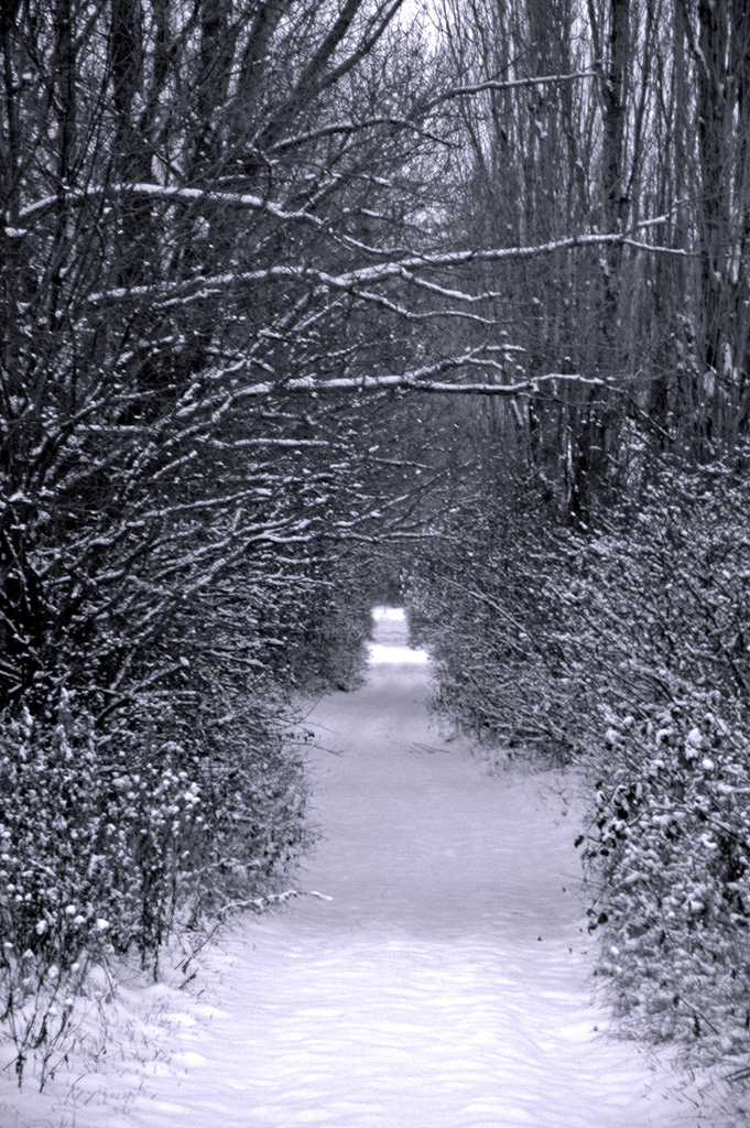 Camí a l'hivern a Llívia, Espanya